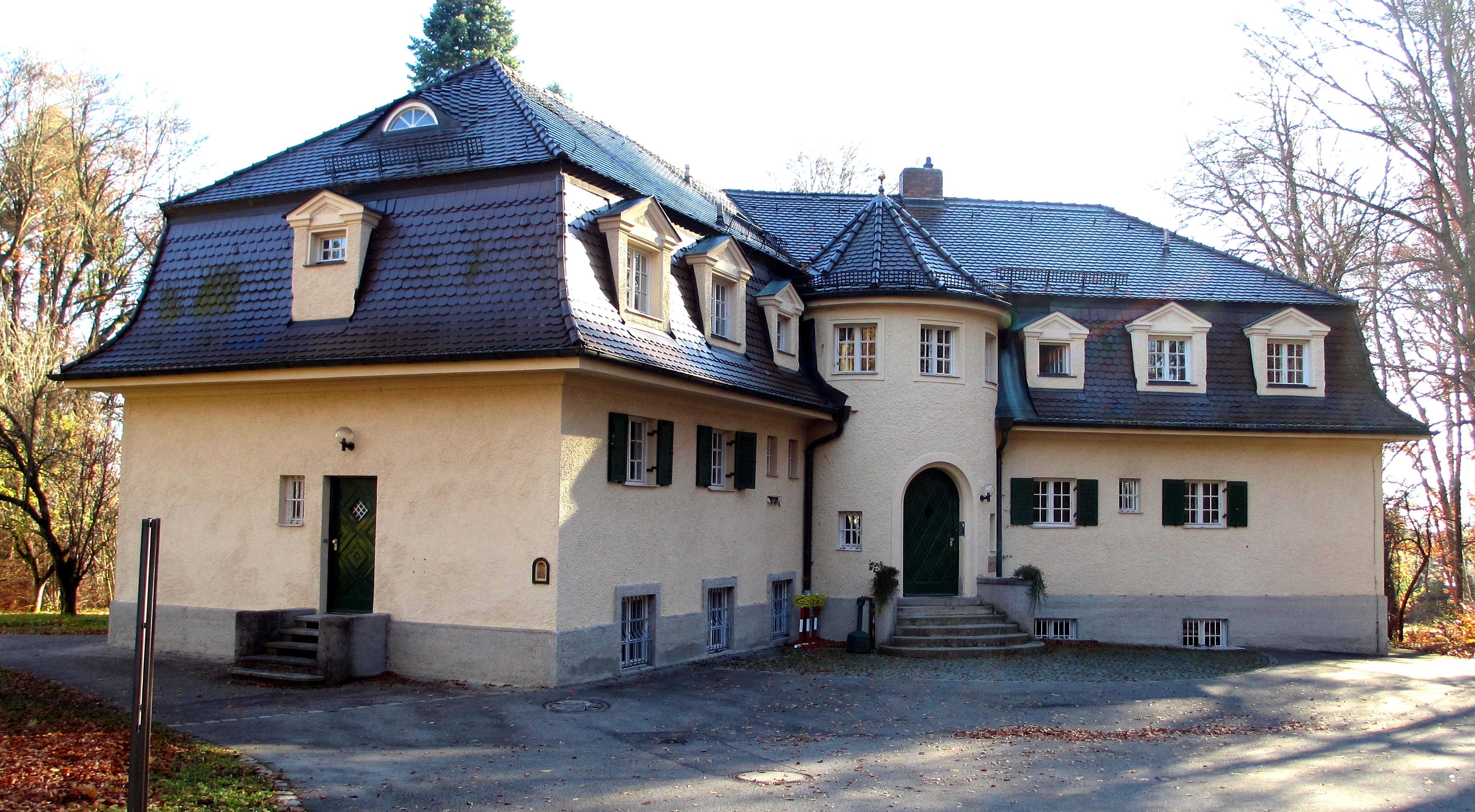 Starnberg, Josef-Sigl-Straße 4, Wernbergschlösschen. 1920 erwarb Erzherzogin Franziska von Österreich, die nachmalige verheiratete Gräfin Wernberg, ein Grundstück von über 50.000 qm. Der renommierte Münchner Architekt Franz Deininger erbaute ihr darauf 1922 eine kleine, sehr individuell gestaltete, sternförmig angeordnete Villa. Wie die Parkanlage gestaltet war, läßt sich heute nicht mehr sagen. Die Zubauten der Fachhochschule für öffentliche Verwaltung und Rechtspflege in Bayern, Fachbereich Rechtspflege, die heute dort ihren Sitz hat, haben weite Bereiche völlig verändert.[1] This is a photograph of an architectural monument.